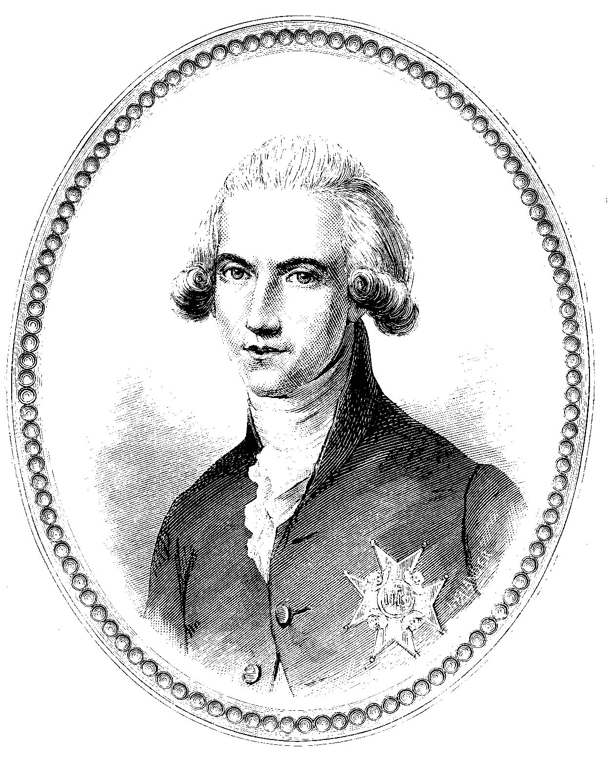 Johan Gabriel Oxenstierna. Bild ur planschverket Femtio porträtt af ryktbara svenskar (sent 1800-tal)